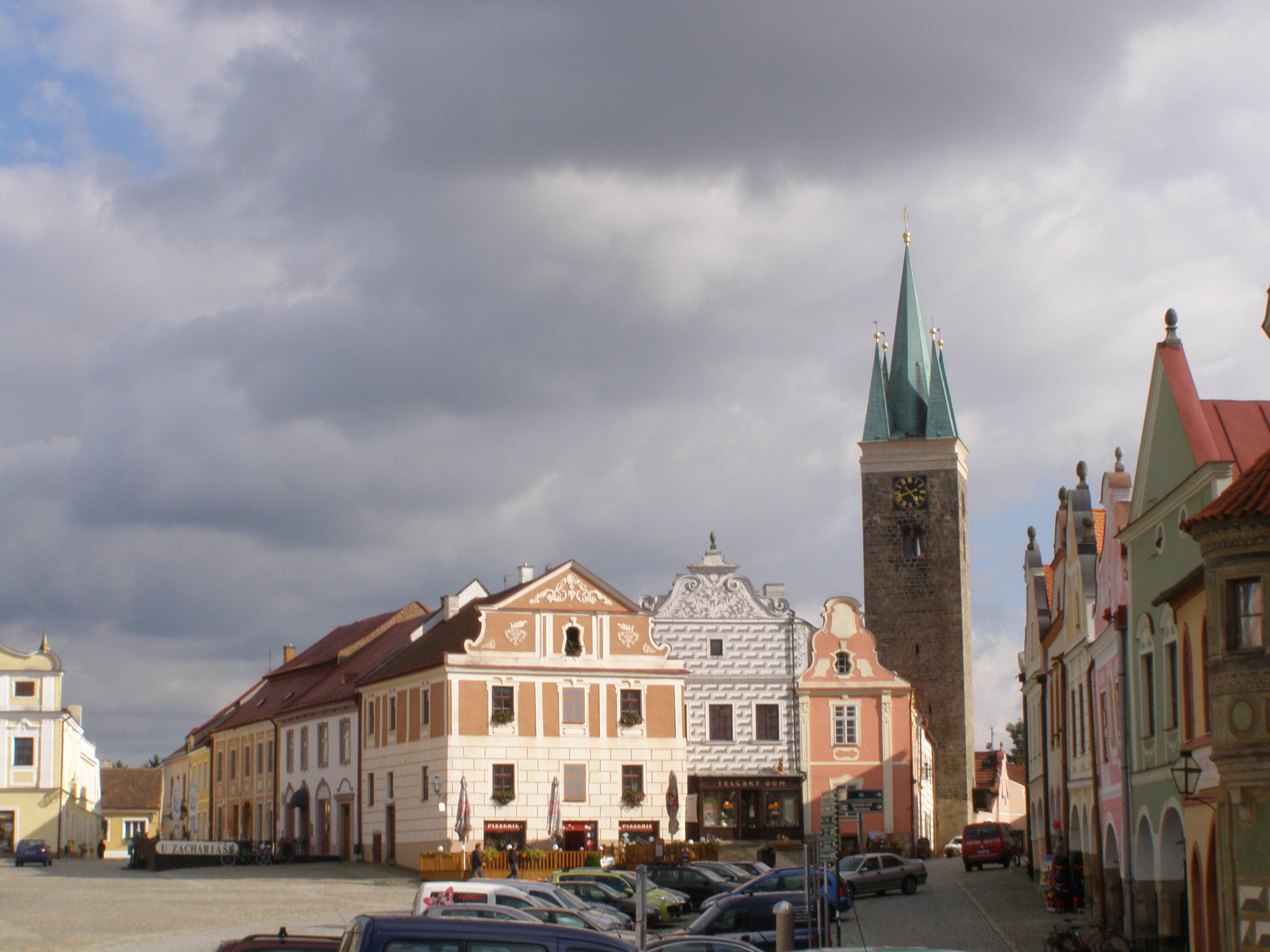 Telč, Vnitřní Město, náměstí Zachariáše z Hradce, vpravo věž kostela sv. Ducha